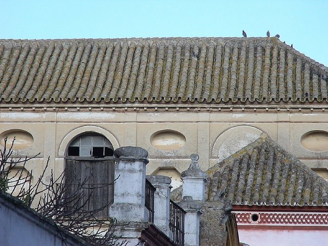 Vista del tejado y de la segunda planta de la Casa de Arizón en Sanlúcar de Barrameda